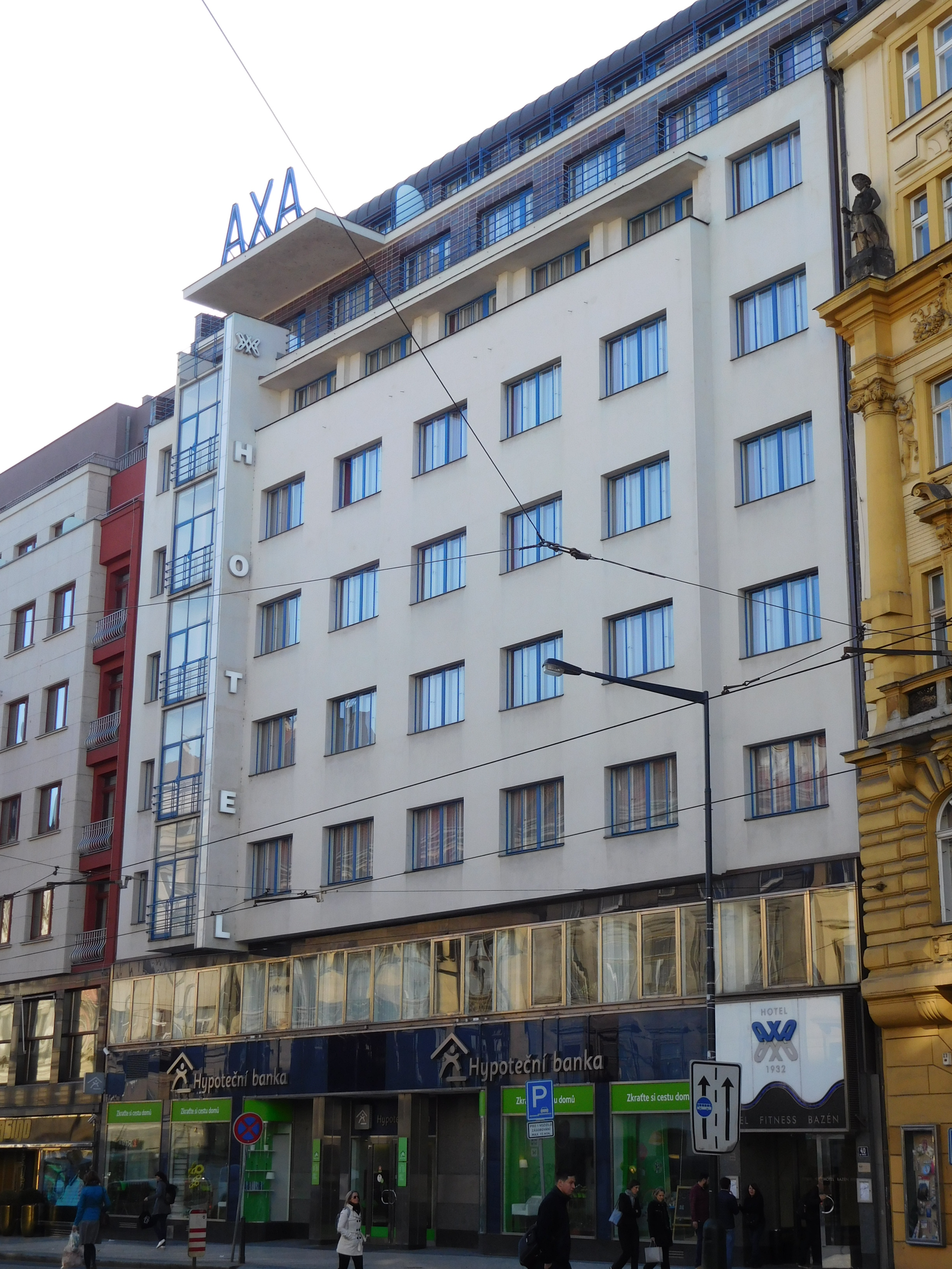 Praha - Nové Město, Na poříčí 40, Hotel AXA